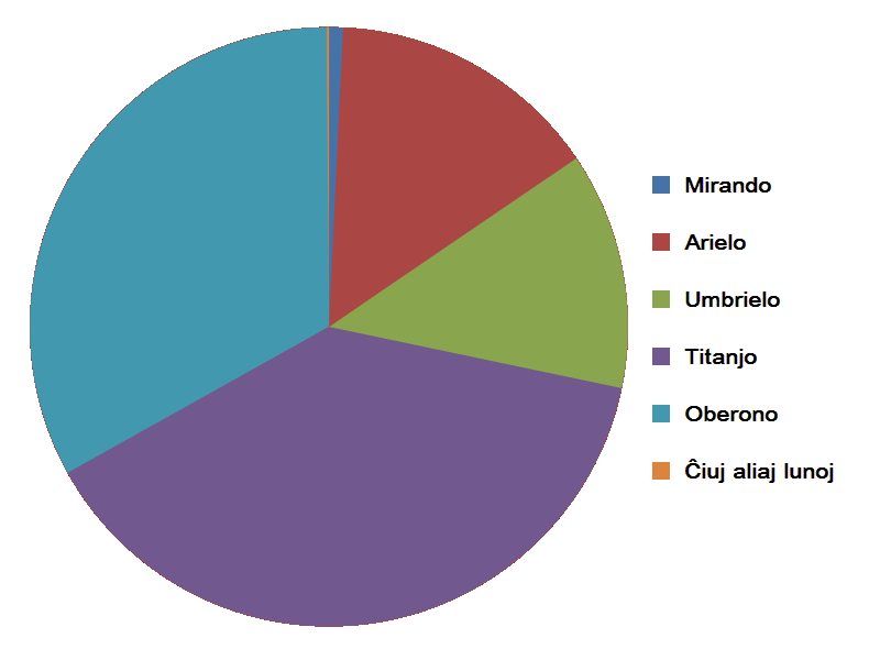 Diagramo montranta la masojn de la satelitoj de Urano. Derivaĵo de Masses of Uranian moons-en.svg